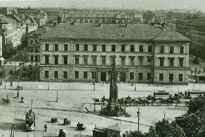 Dresden